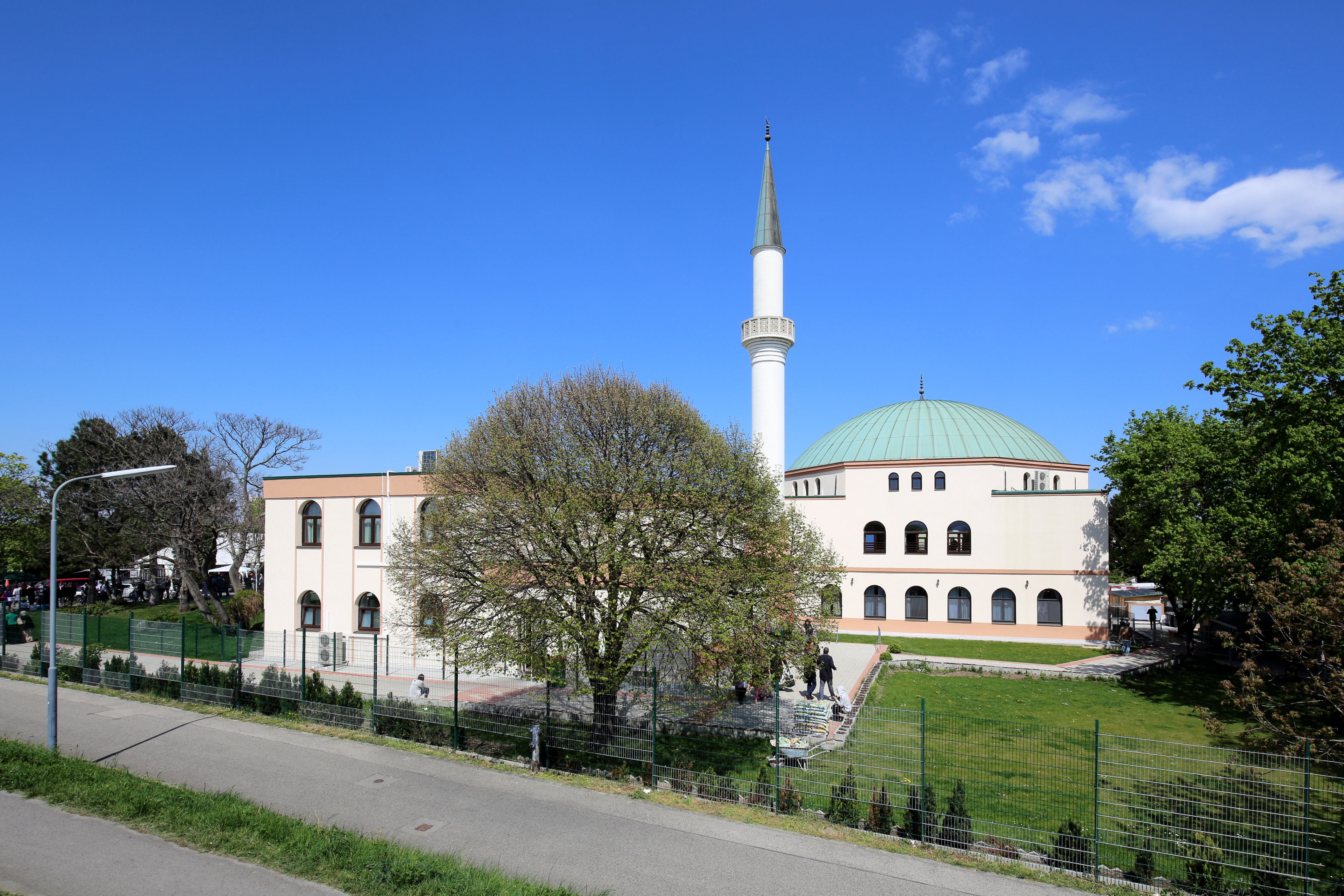 Südwestansicht des Islamischen Zentrum Wien in Bruckhaufen, ein Ortsteil im 21. Wiener Gemeindebezirk Floridsdorf. Die Moschee mit einem 32 m hohen Minarett und einer Kuppel mit rund 20 m Durchmesser wurde von 1975 bis 1979 von Baumeister Richard Lugner im Auftrag des saudi-arabischen Königs Faisal ibn Abd al-Aziz errichtet.